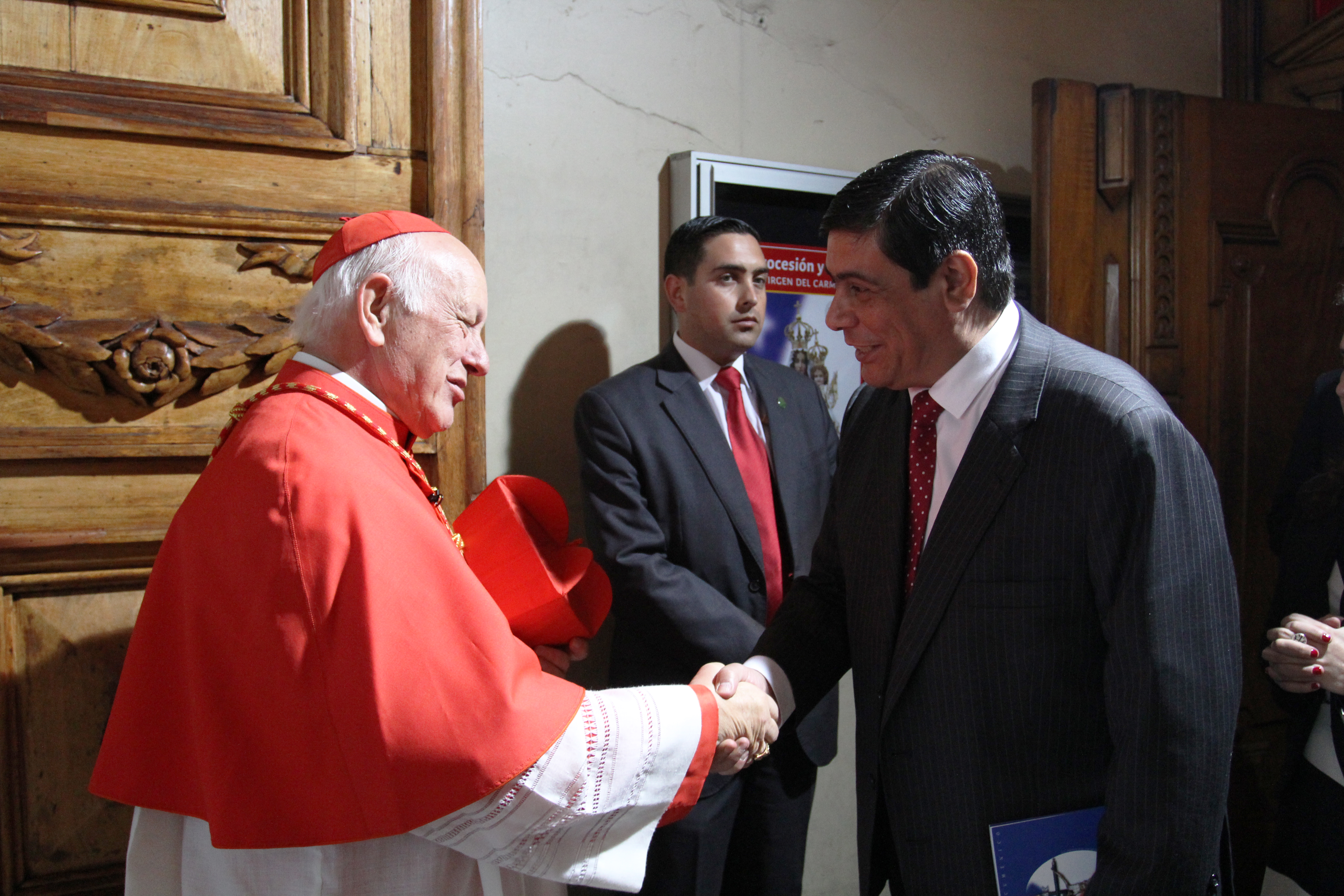 Le ministre Víctor Osorio avec le cardinal Ricardo Ezzati